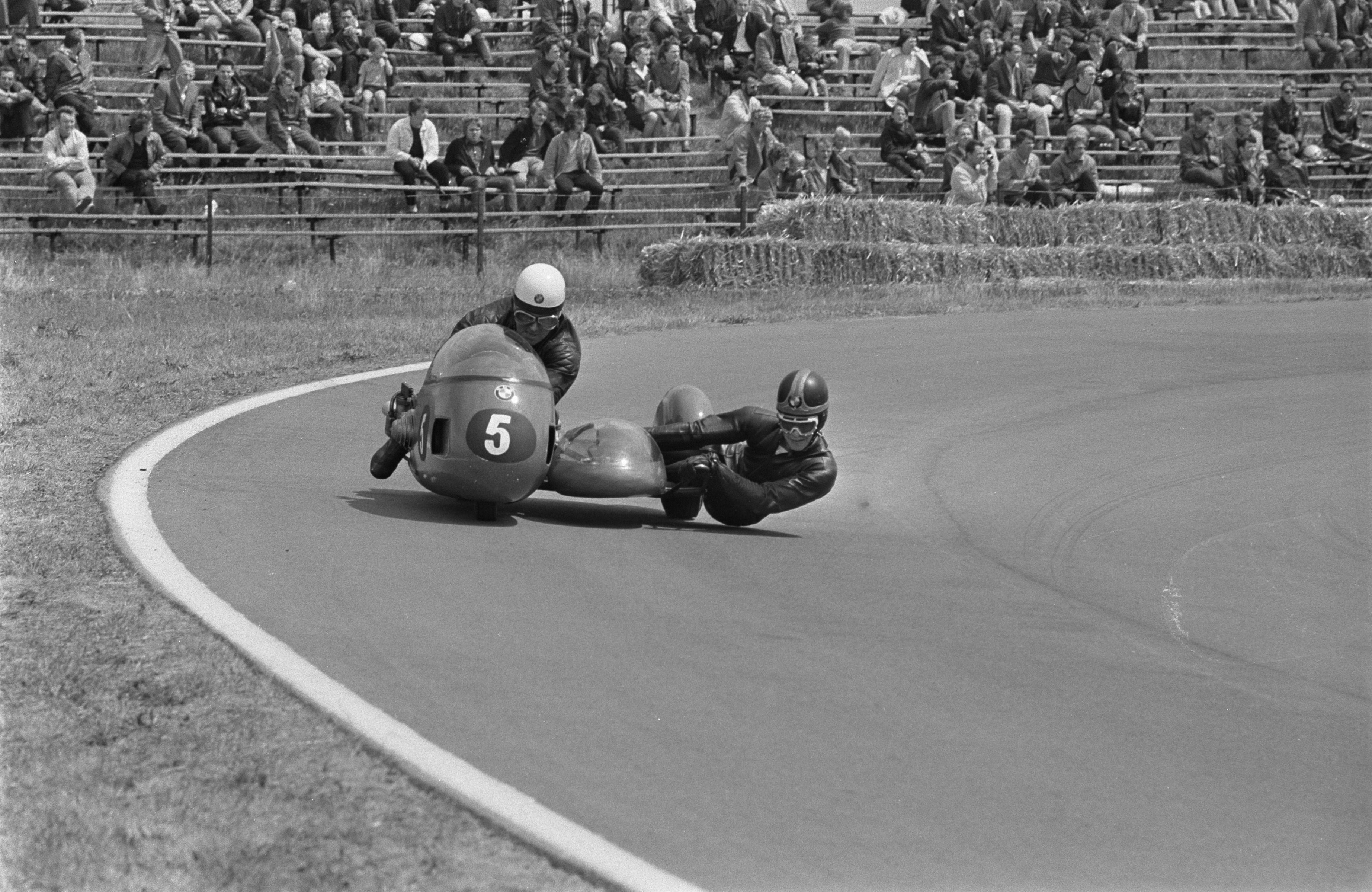 Collectie / Archief : Fotocollectie Anefo Reportage / Serie : TT Assen 1970 Beschrijving : TT-races in Assen. training; Heinz Luthringshauser (Duitsland) met Hans-Jürgen Cusnik in zijspan Annotatie : Bij de uiteindelijke race was de Nederlander Klaas de Geus de bakkenist Datum : 25 juni 1970 Locatie : Assen Trefwoorden : motorsport, races Persoonsnaam : Cusnick Instellingsnaam : TT Fotograaf : Verhoeff, Bert / Anefo Auteursrechthebbende : Nationaal Archief Materiaalsoort : Negatief (zwart/wit) Nummer archiefinventaris : bekijk toegang 2.24.01.05 Bestanddeelnummer : 923-6220